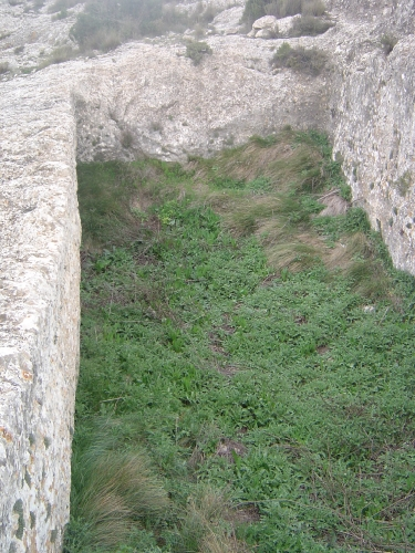 Aljibe ibérico en las ruinas del poblado ibérico del Castellar de Meca.